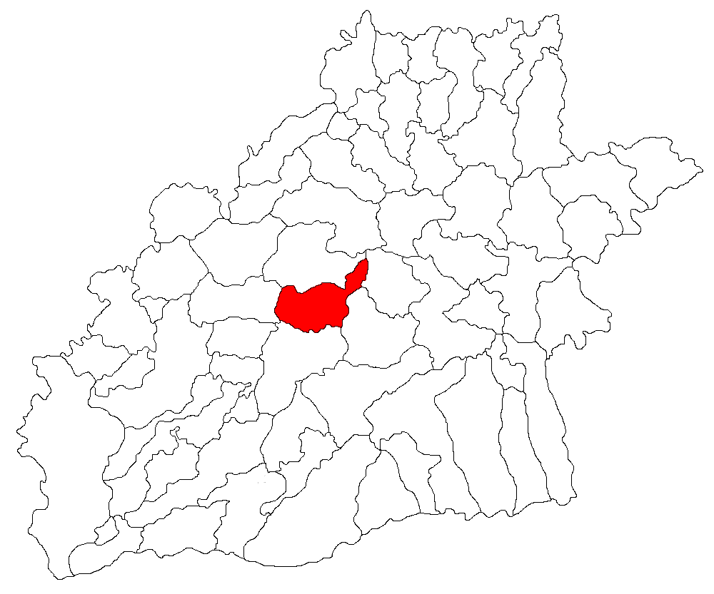 Categorie:Hărţi ale judeţului Sibiu